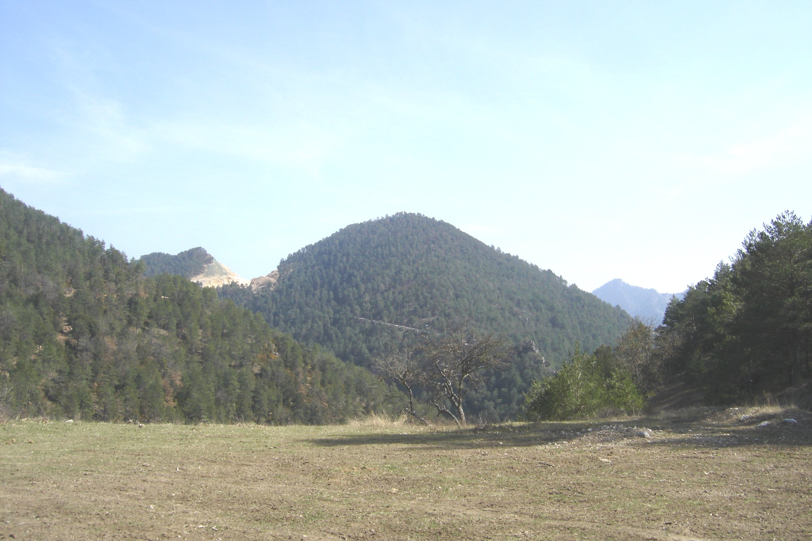 El vessant oriental del Montlleó (Guixers, La Coma i la Pedra) a la Vall de Lord (Solsonès) vist des de prop de Sant Lleïr de Casabella. A l'esquerra, la guixera del Coll de Berla.